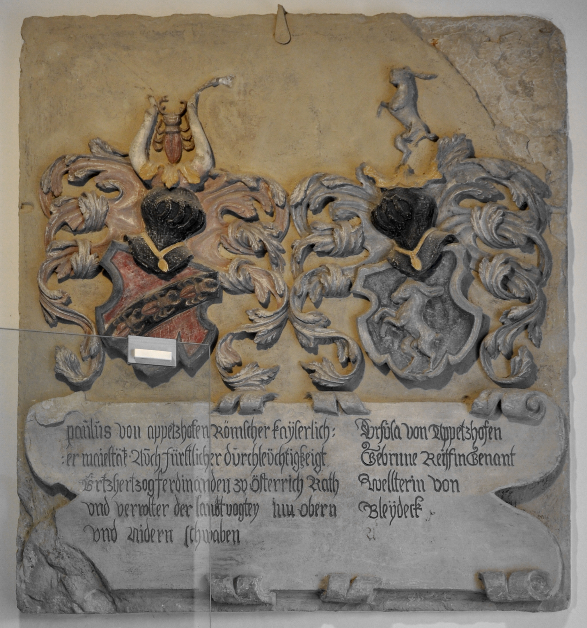 Wappenstein Paulus von Appetzhofen (1566-1684), Errichter des Schlössles im 16. Jh., und seiner Frau Ursula Reiff, genannt Wellter von Bleydeck